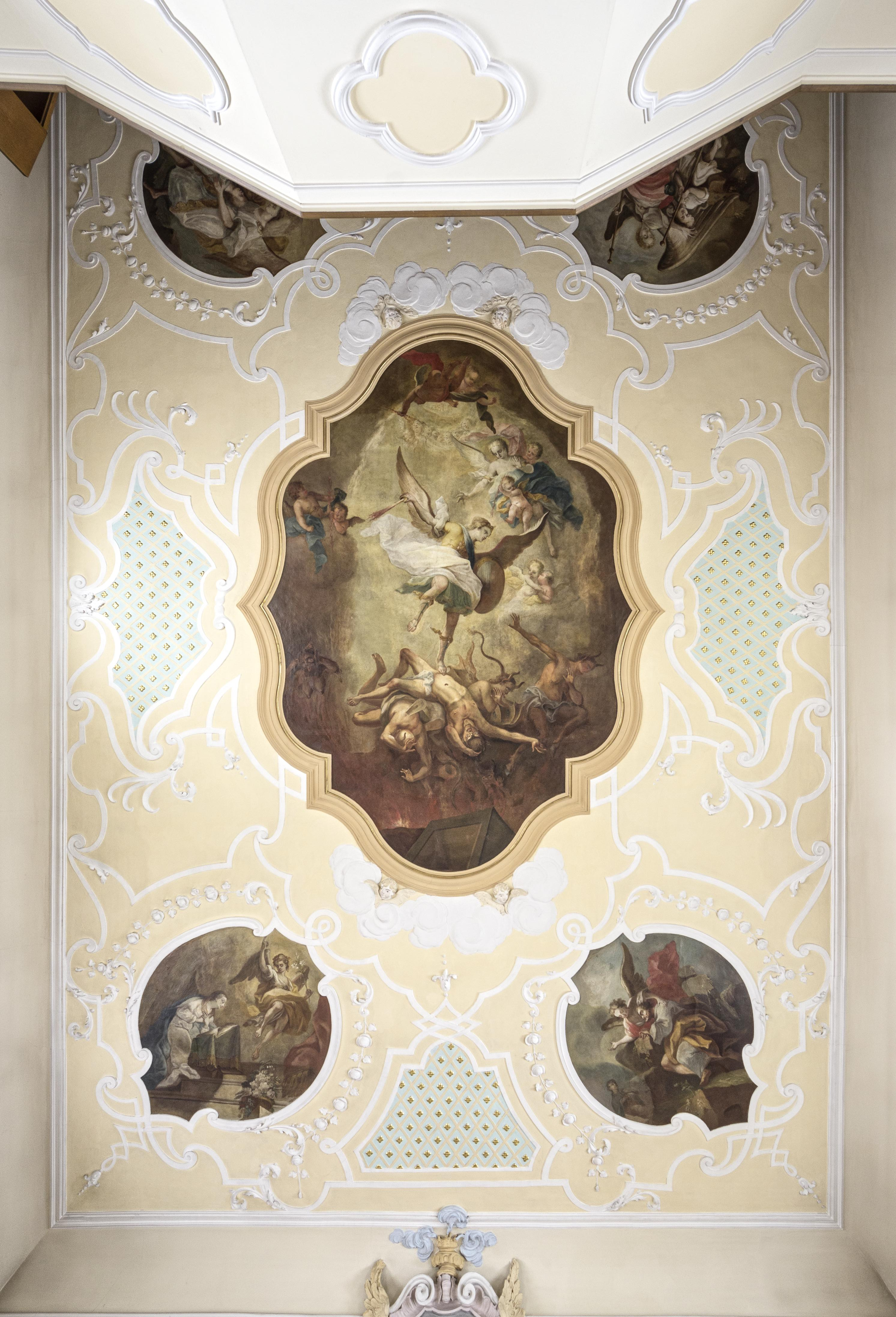 Bilder aus St. Märgen Bilder aus der Ohmenkapelle Deckengemälde in der Kapelle